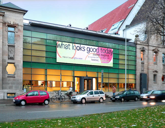 Kestner Gesellschaft Hannover Foto aufgenommen von Benutzer Benutzer:Axel Hindemith, November 2005